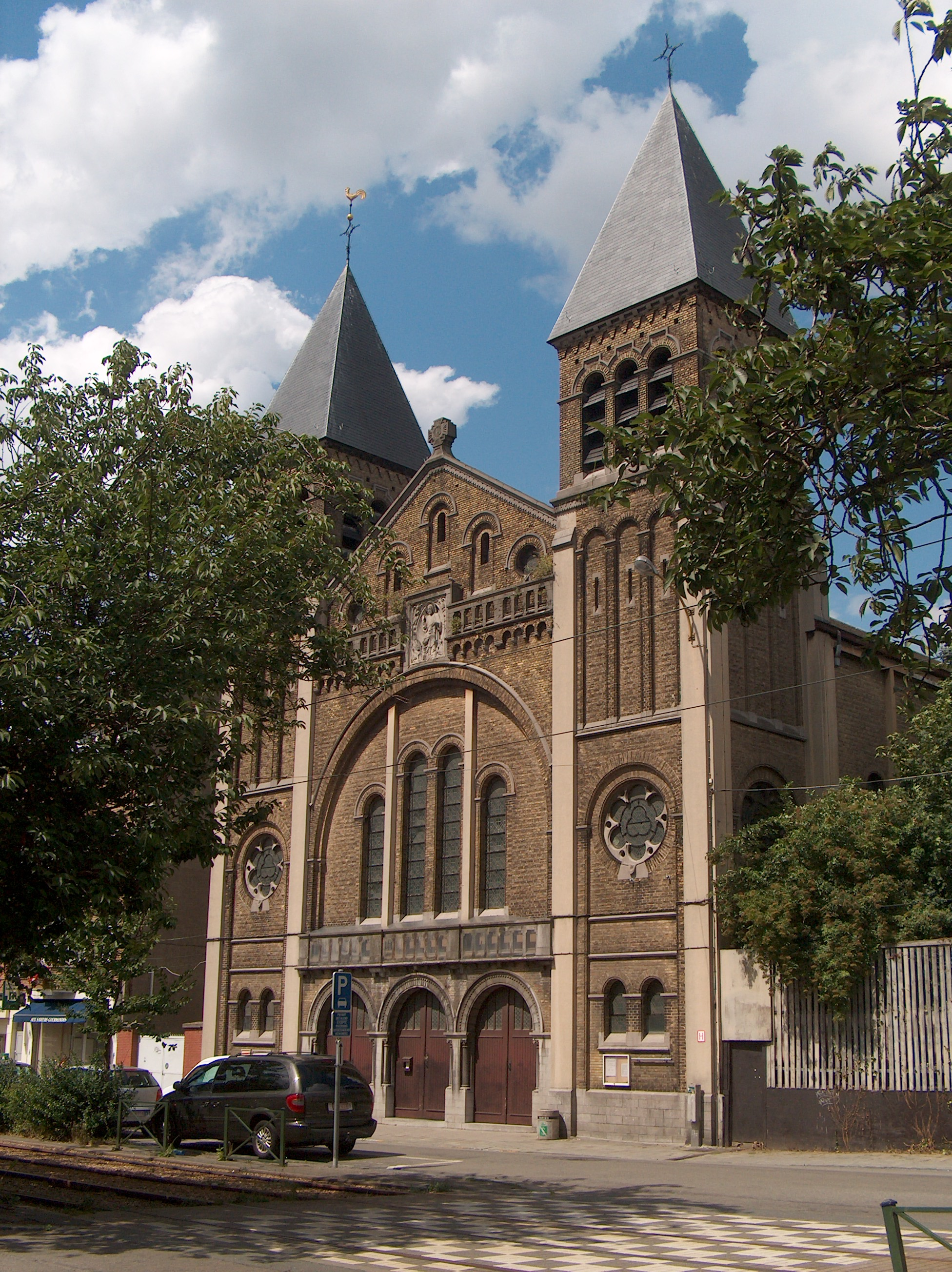 L'église Sainte-Thérèse d'Avila à Schaerbeek, Bruxelles, Belgique.